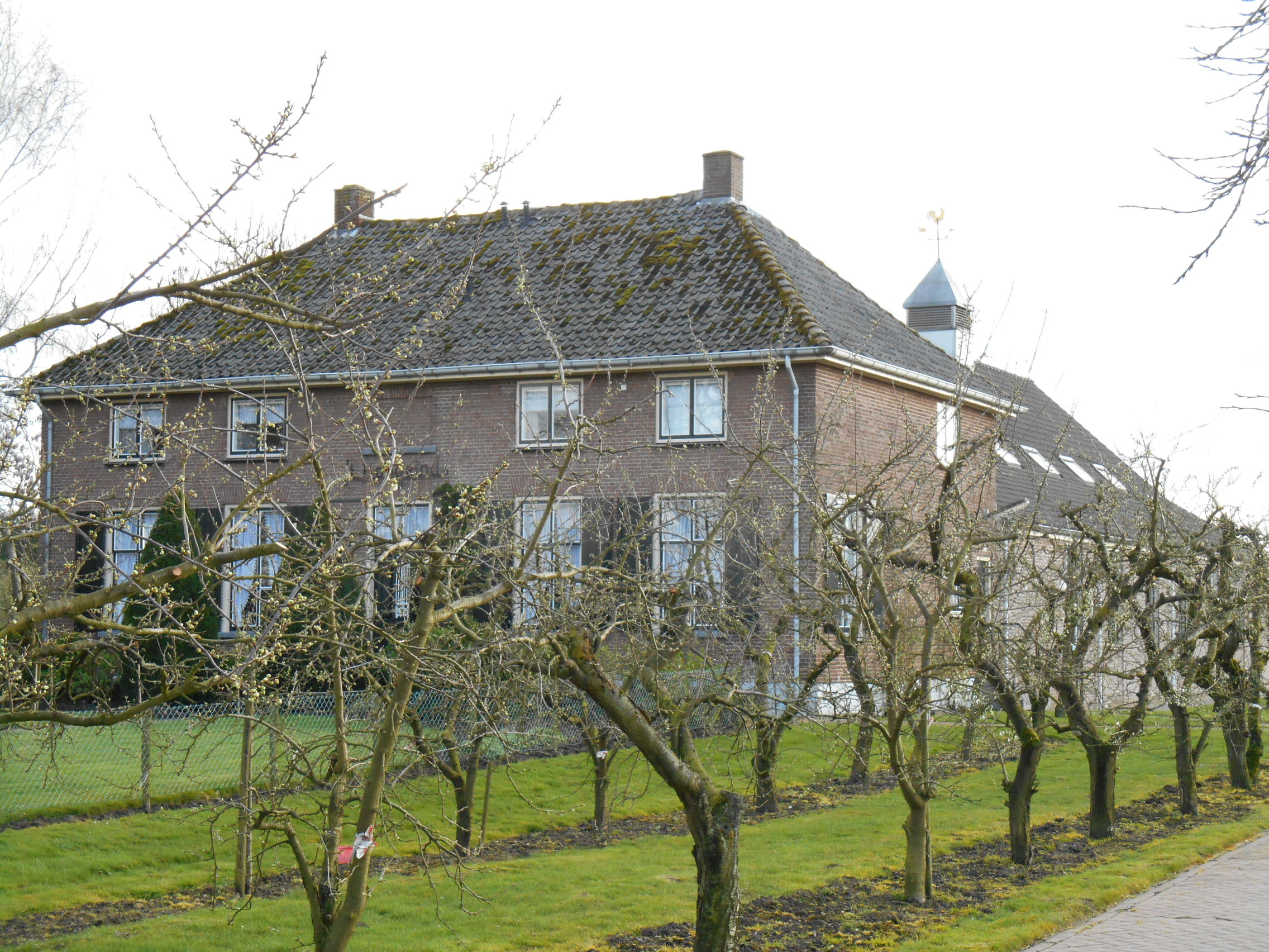 Zeêuws: Oud Gereformeerde Gemeente Geldermalsen